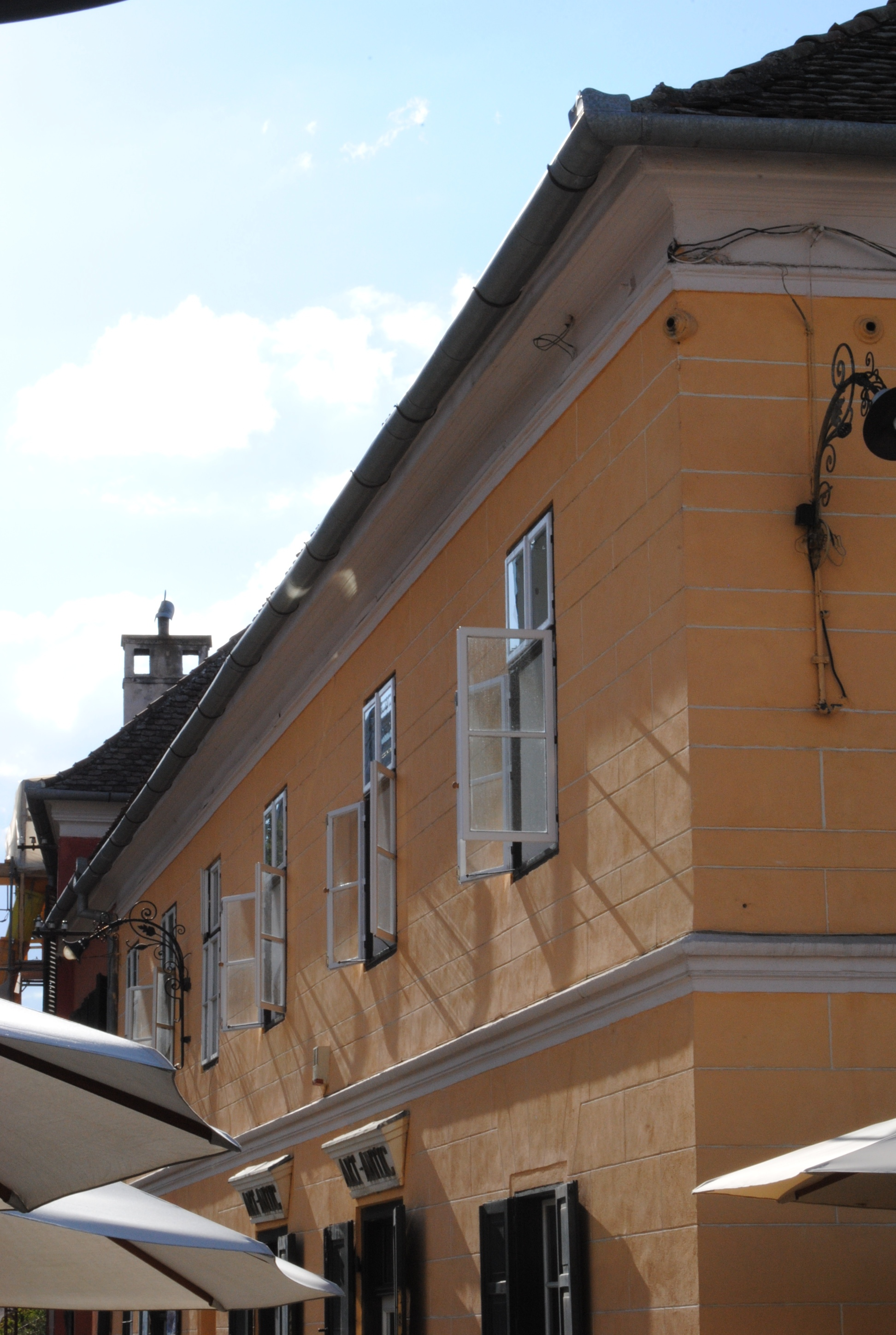 Casă, sf. sec. XV